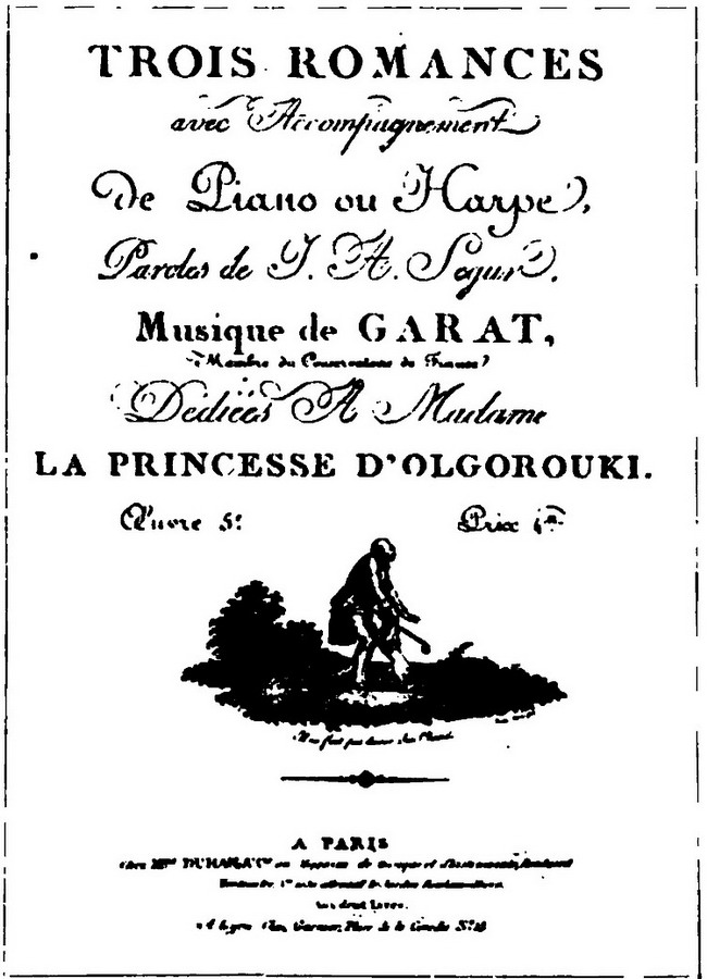 Titre d'édition de trois romances de PJ Garat, avec vignette eau-forte de Ruotte (vers 1803)